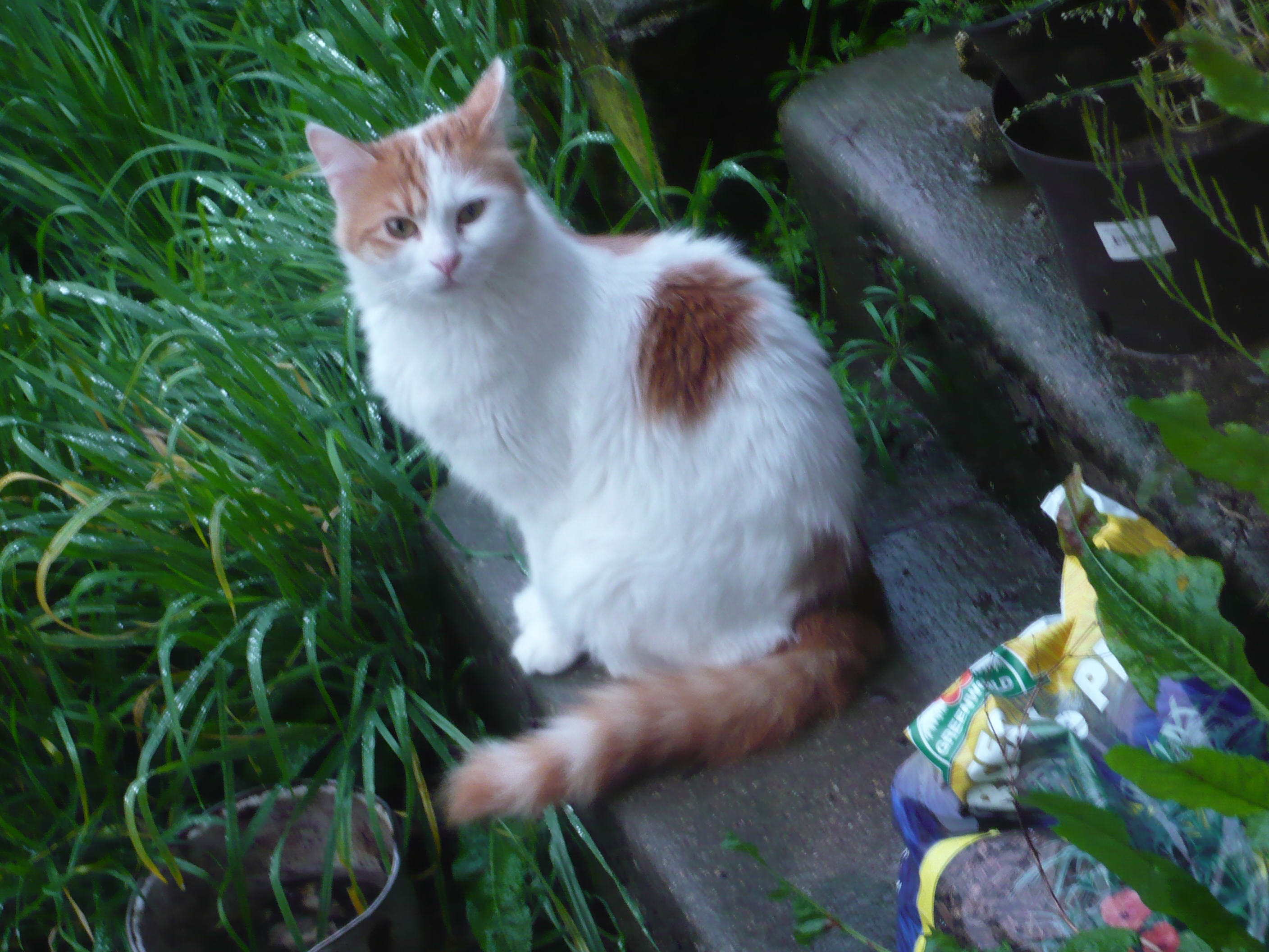 Ma Turc de Van de 3 ans.